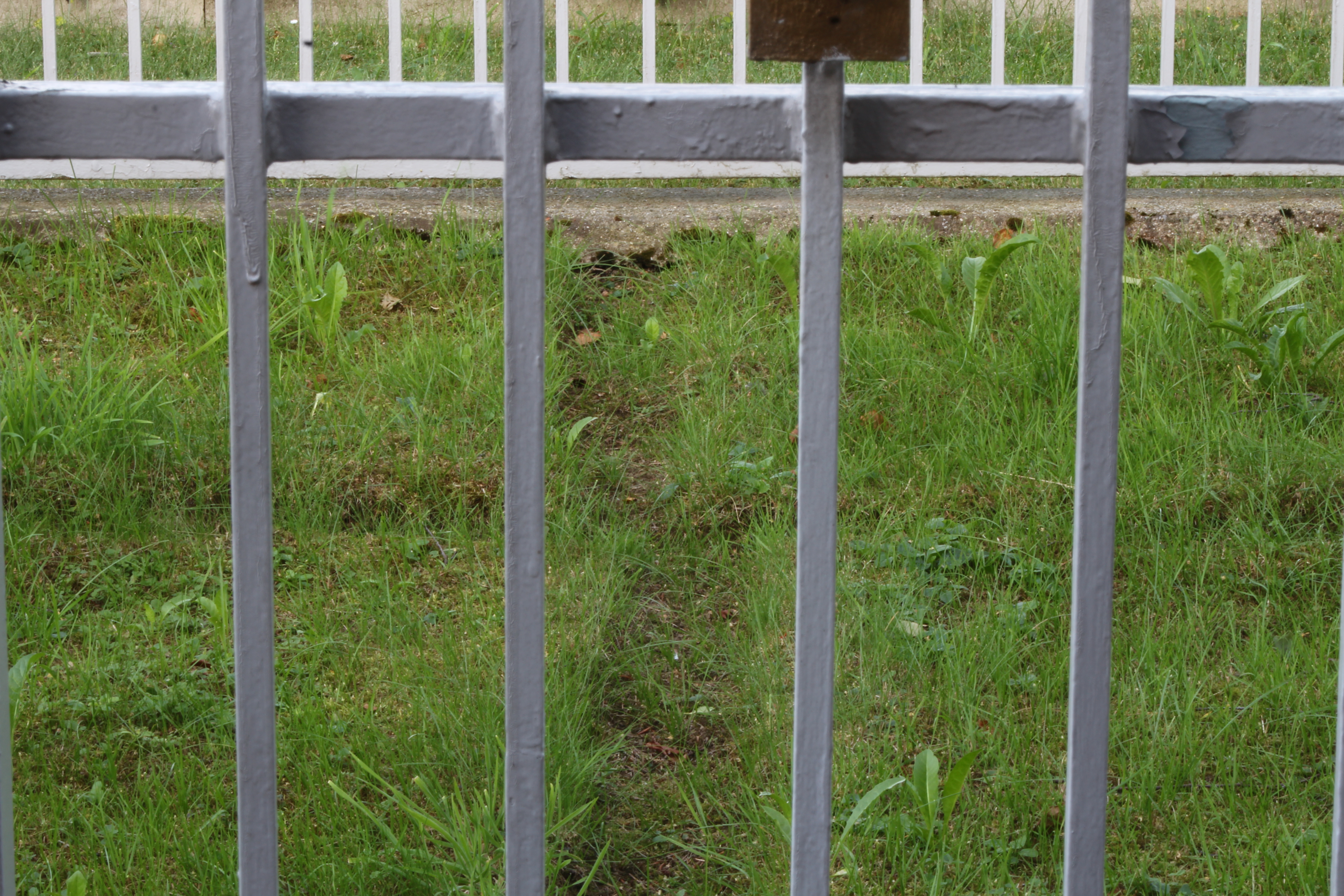 Detailansicht des Rasenkreuzes Meggen